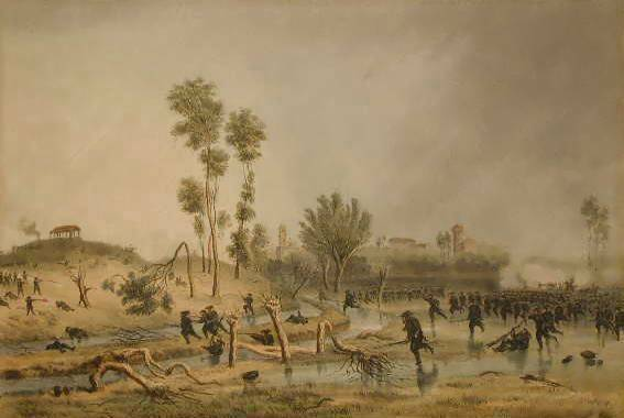 Attacco di Palestro, operato dalla IV Divisione Sarda del Cialdini, ridotto e ritoccato, litografia